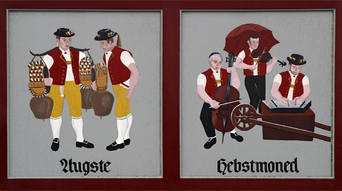 Description